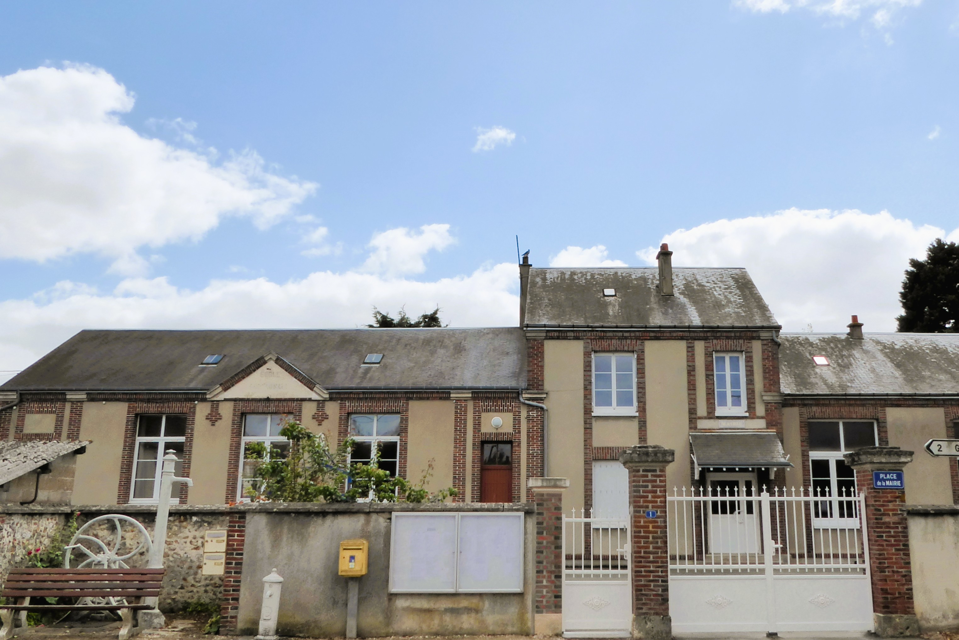 Mairie-école de Mittainvilliers, Eure-et-Loir (France).